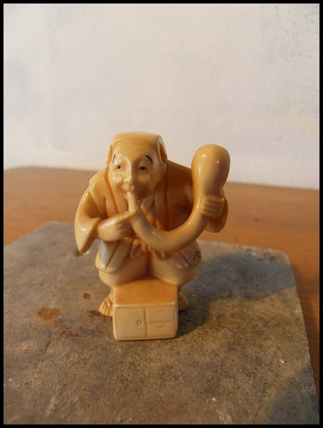 Homme jouant de la musique